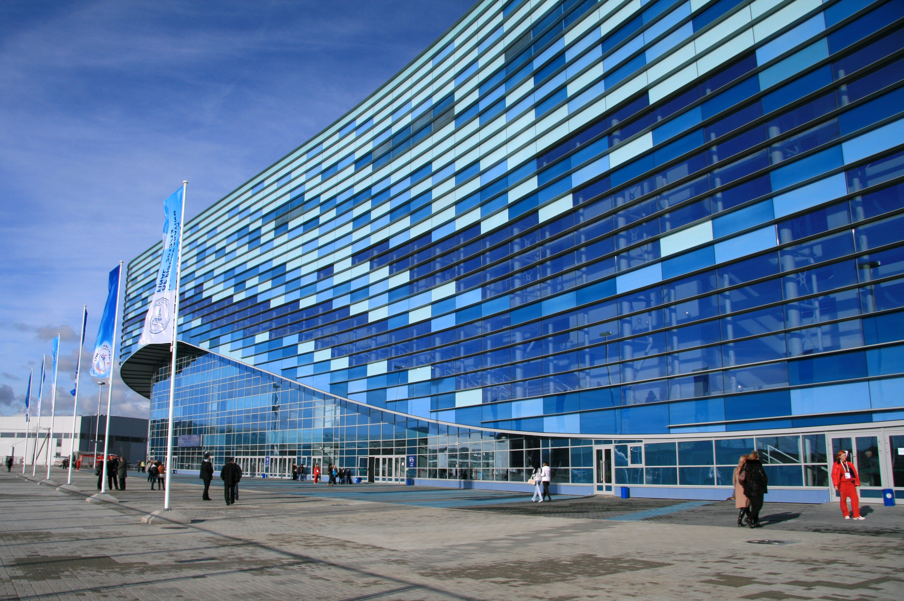 Ледовый дворец спорта "Айсберг", г. Сочи. Декабрь 2012 года.